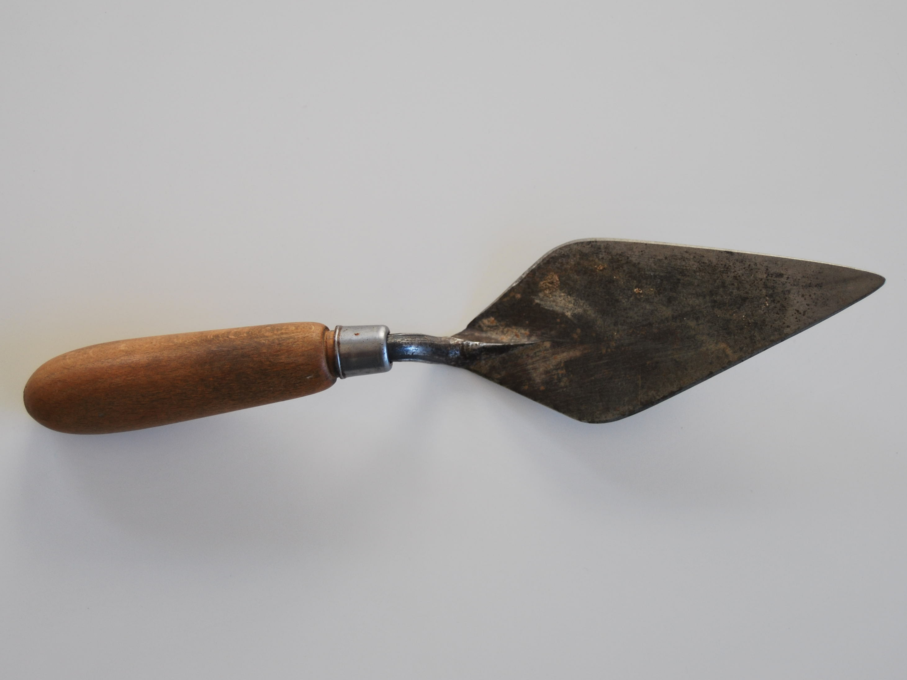 Archäologenkelle der Firma WHS